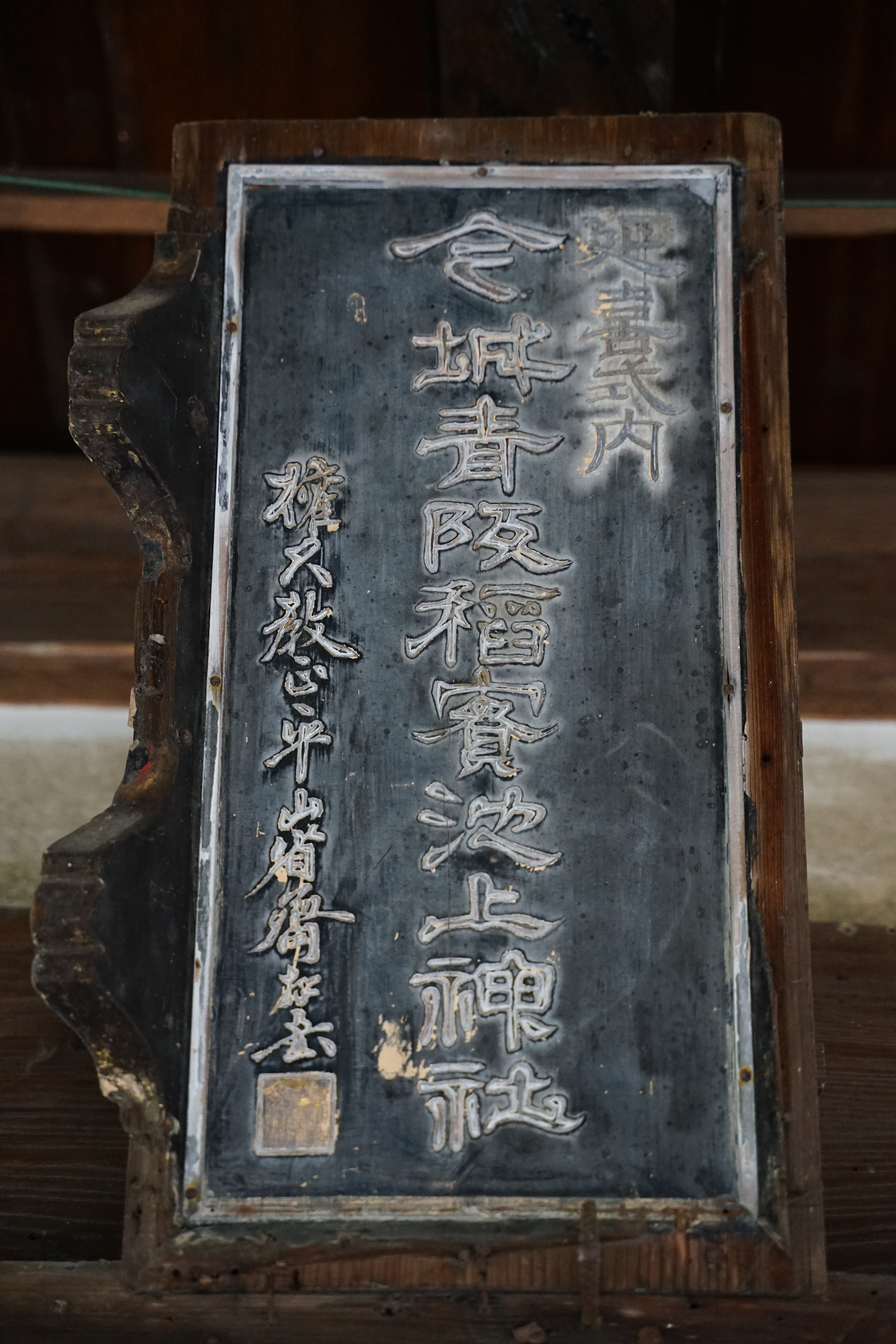 埼玉県神川町 今城青八坂稲実池上神社の扁額